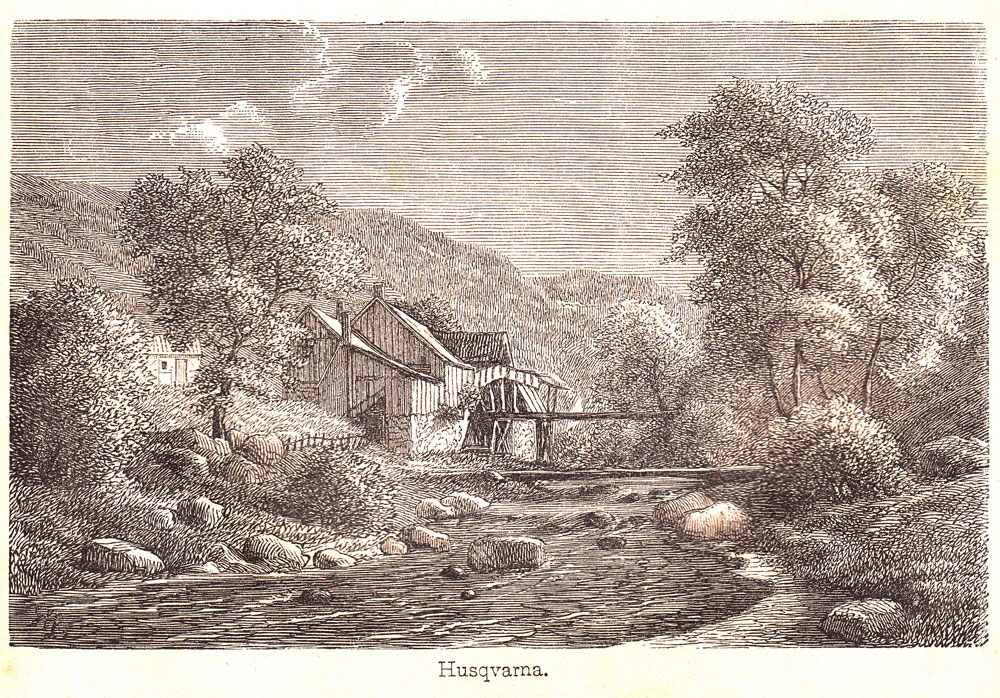 Husqvarna. Xylography